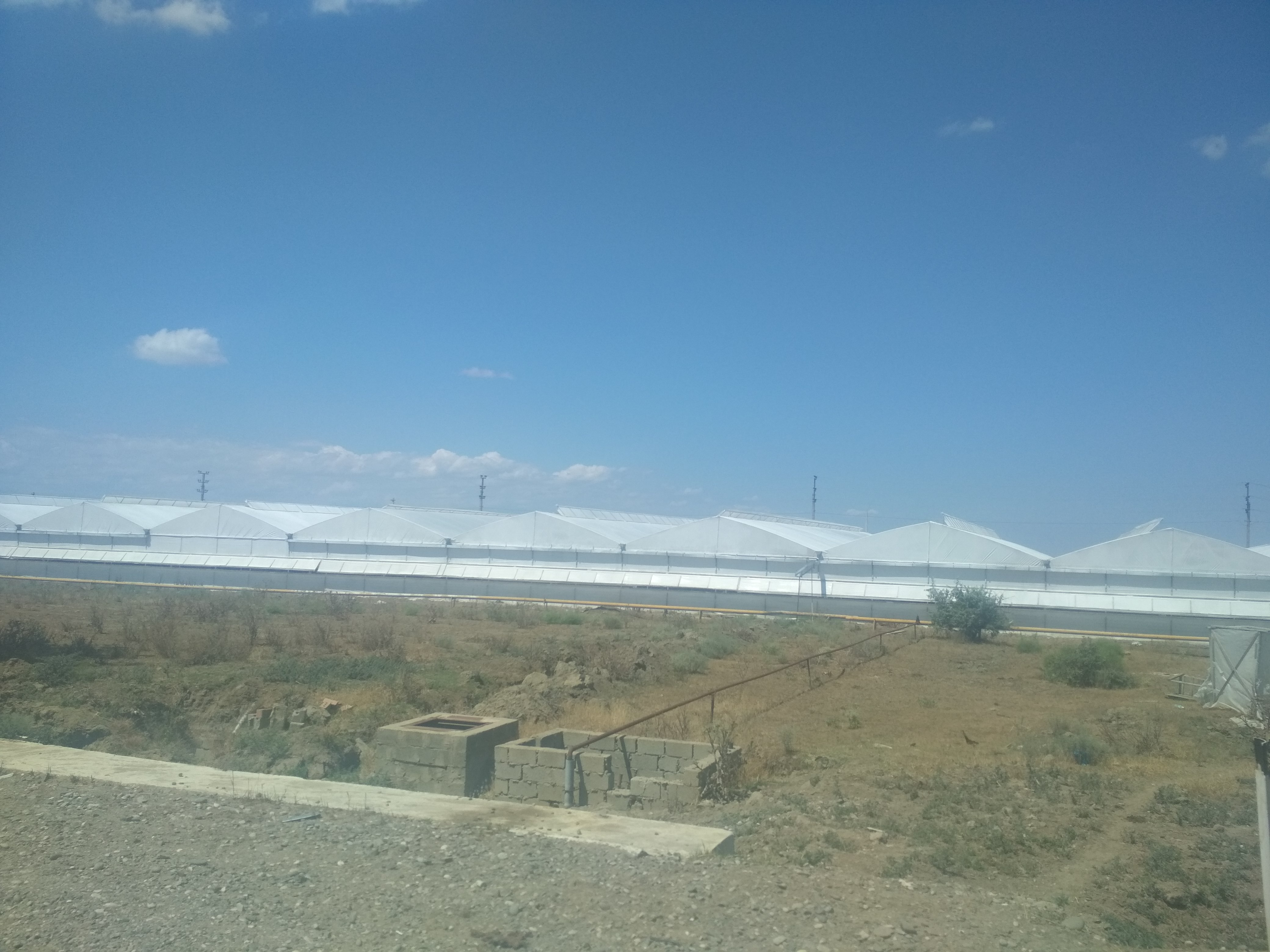 Нохчийн: Парники в Гамияхе